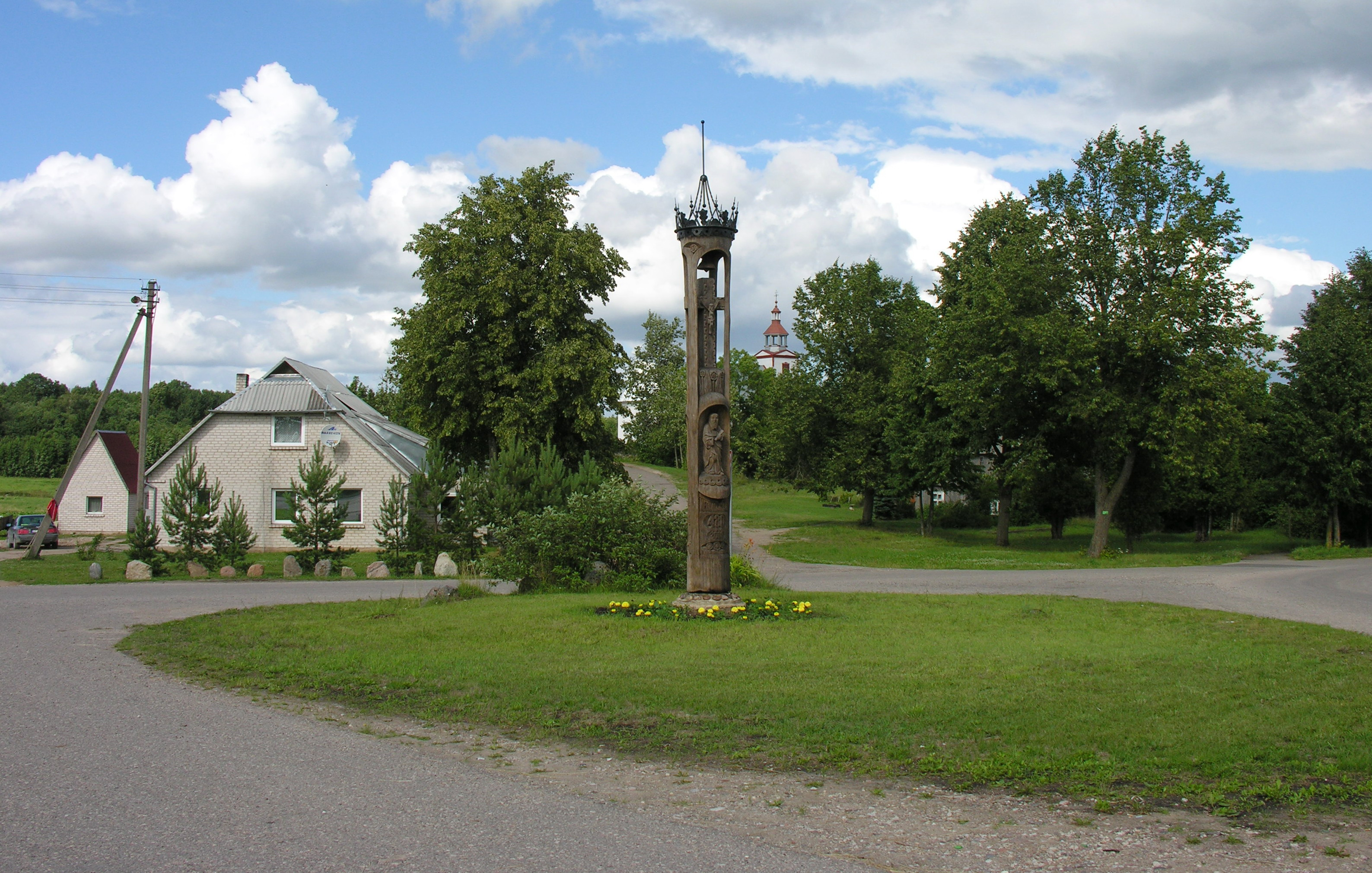 Žemaitėška: Nerimdātē (lt. Nerimdaičiai), Žemaitėjė, 2008-07-17